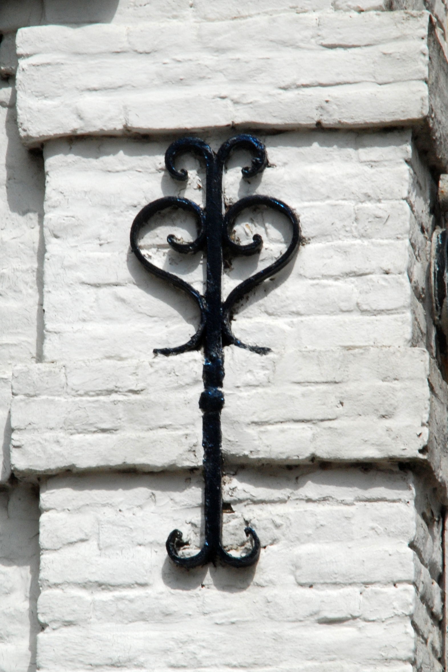 Ancre de façade en forme de cœur Belgique - Brabant wallon - Court-Saint-Étienne